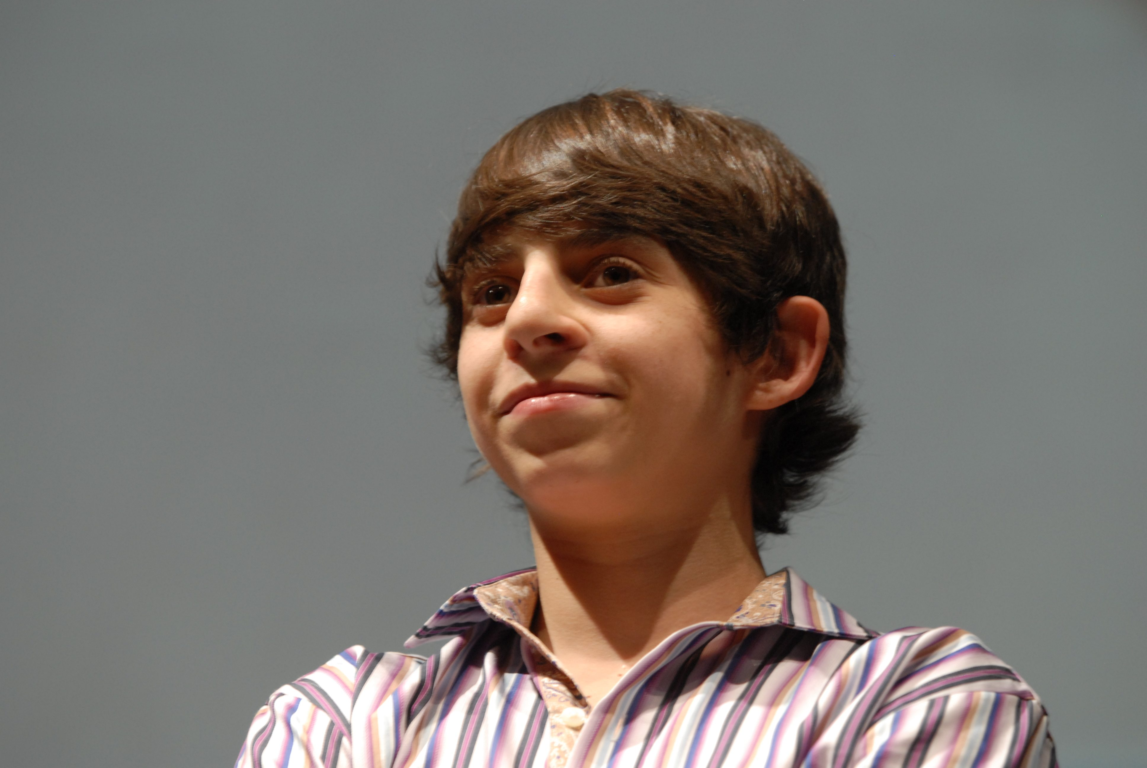 21/03/09 El actor colombiano Mois�s Arias previo a la proyecci�n de la pel�cula The Perfect Game